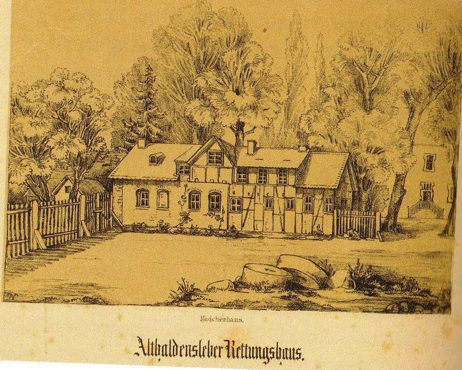 Althaldensleben, Knabenrettungshaus